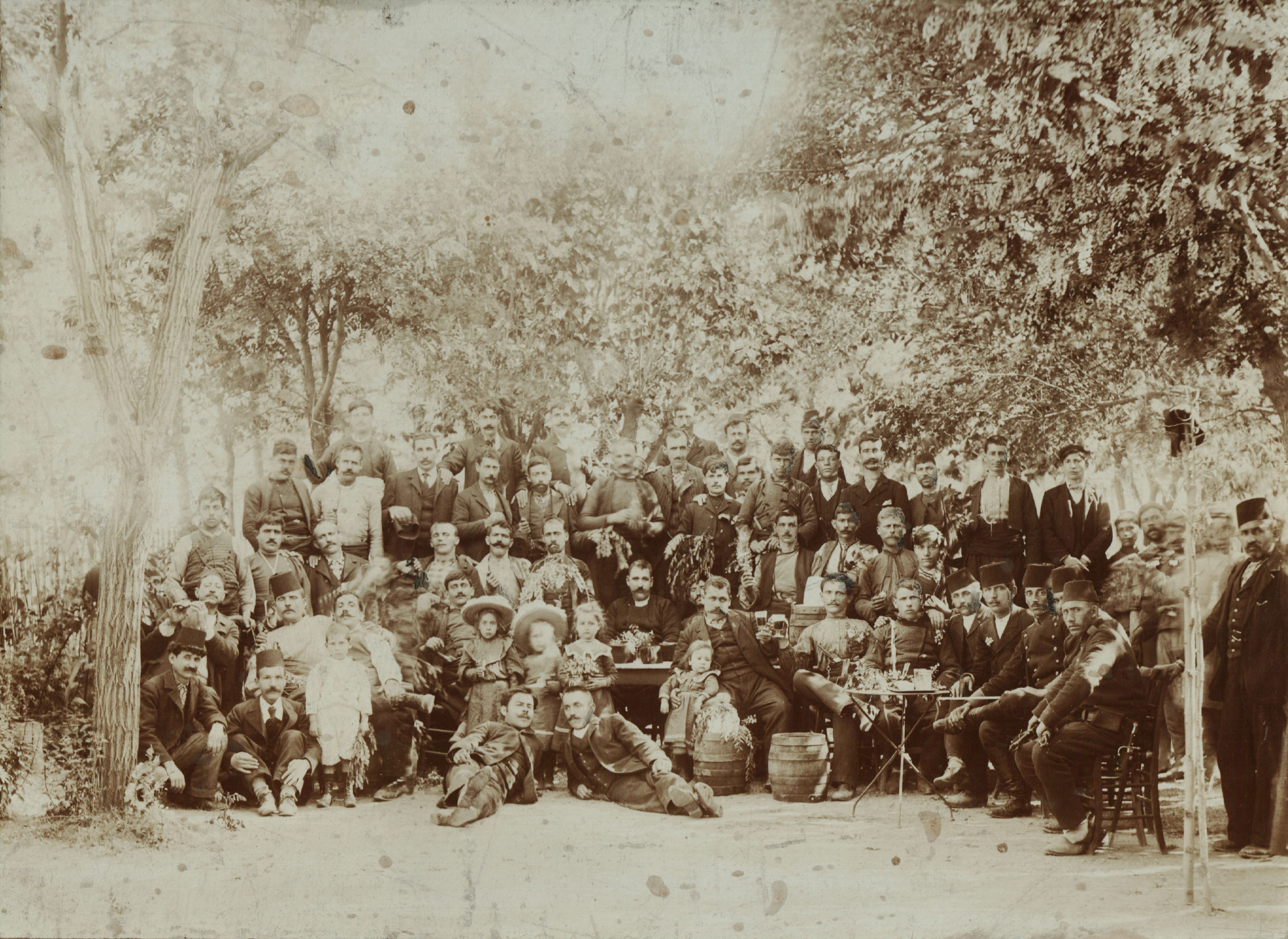 Празненство на касапското дружество, Солун, 1906 г.